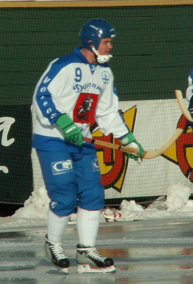 Aleksandr Tjukavin during Bandy World Cup 2007